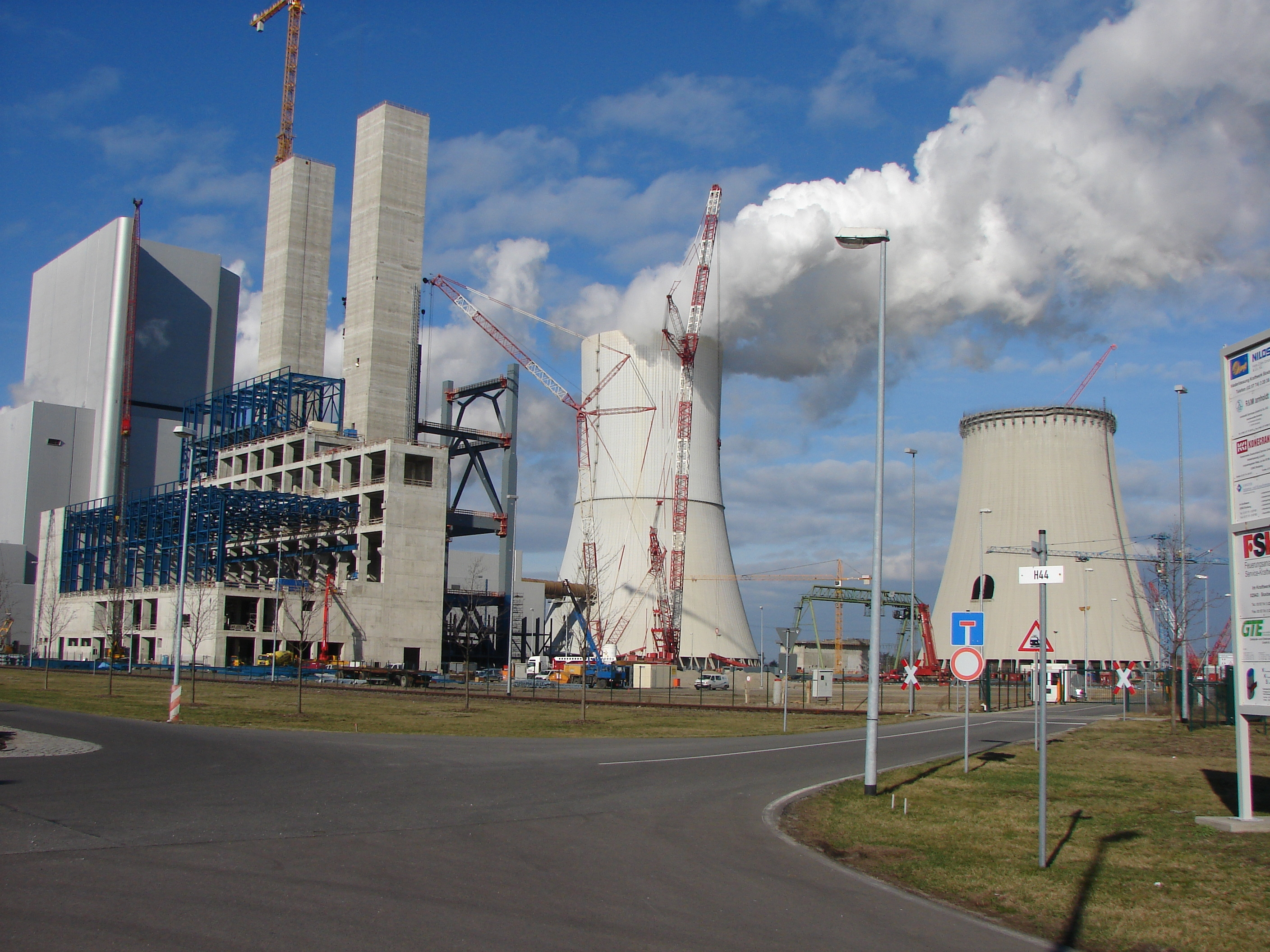 Kraftwerk Boxberg Neubaublock R - Bau des Kesselgerüstes